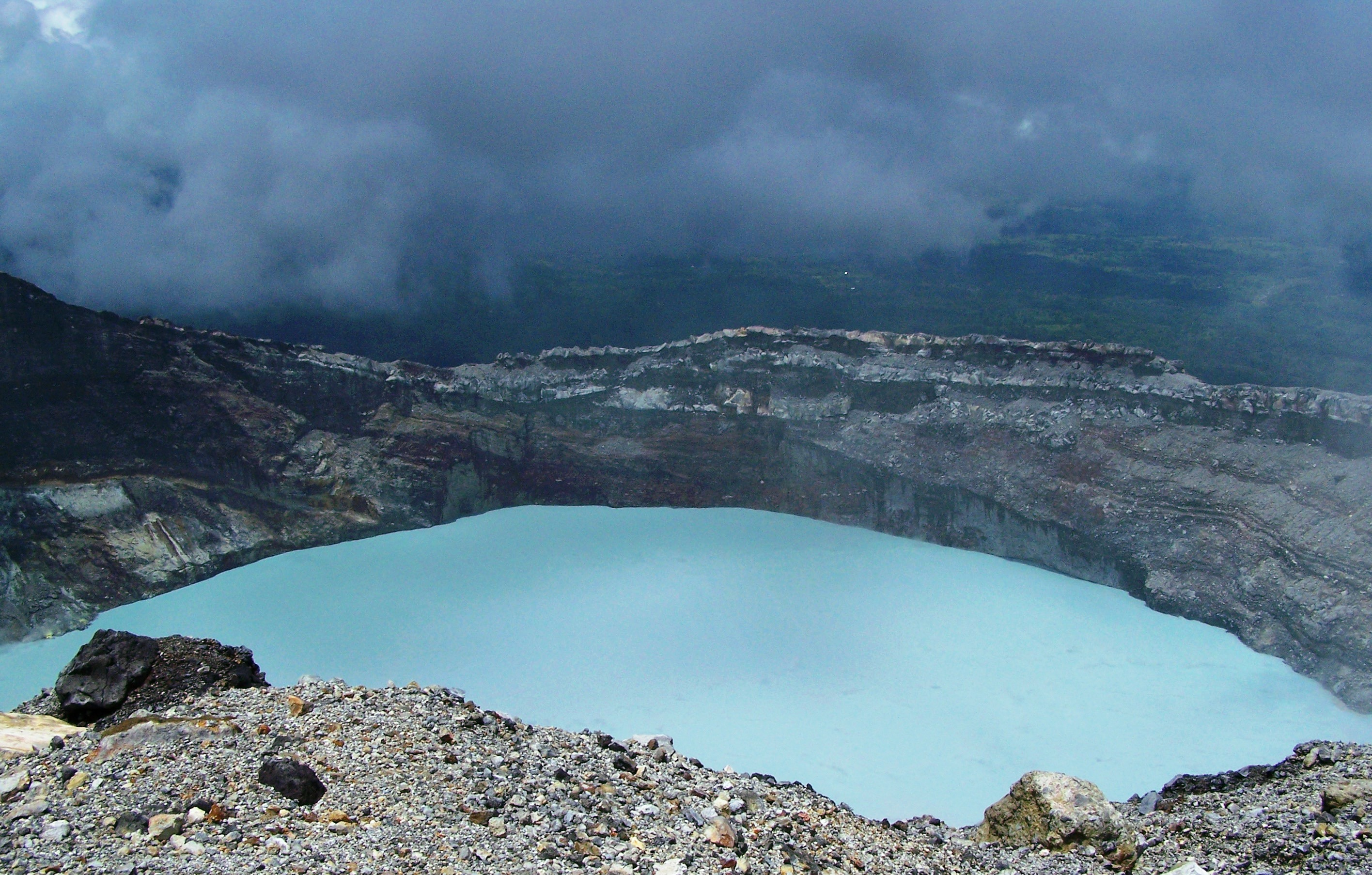 Laguna cratérica del volcán Rincón de la Vieja, Guanacaste, Costa Rica.